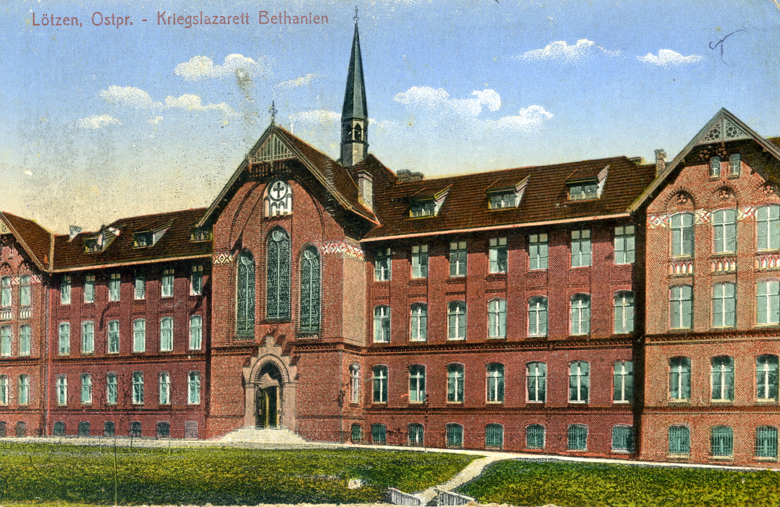 Kriegslazarett Bethanien Lötzen 1915